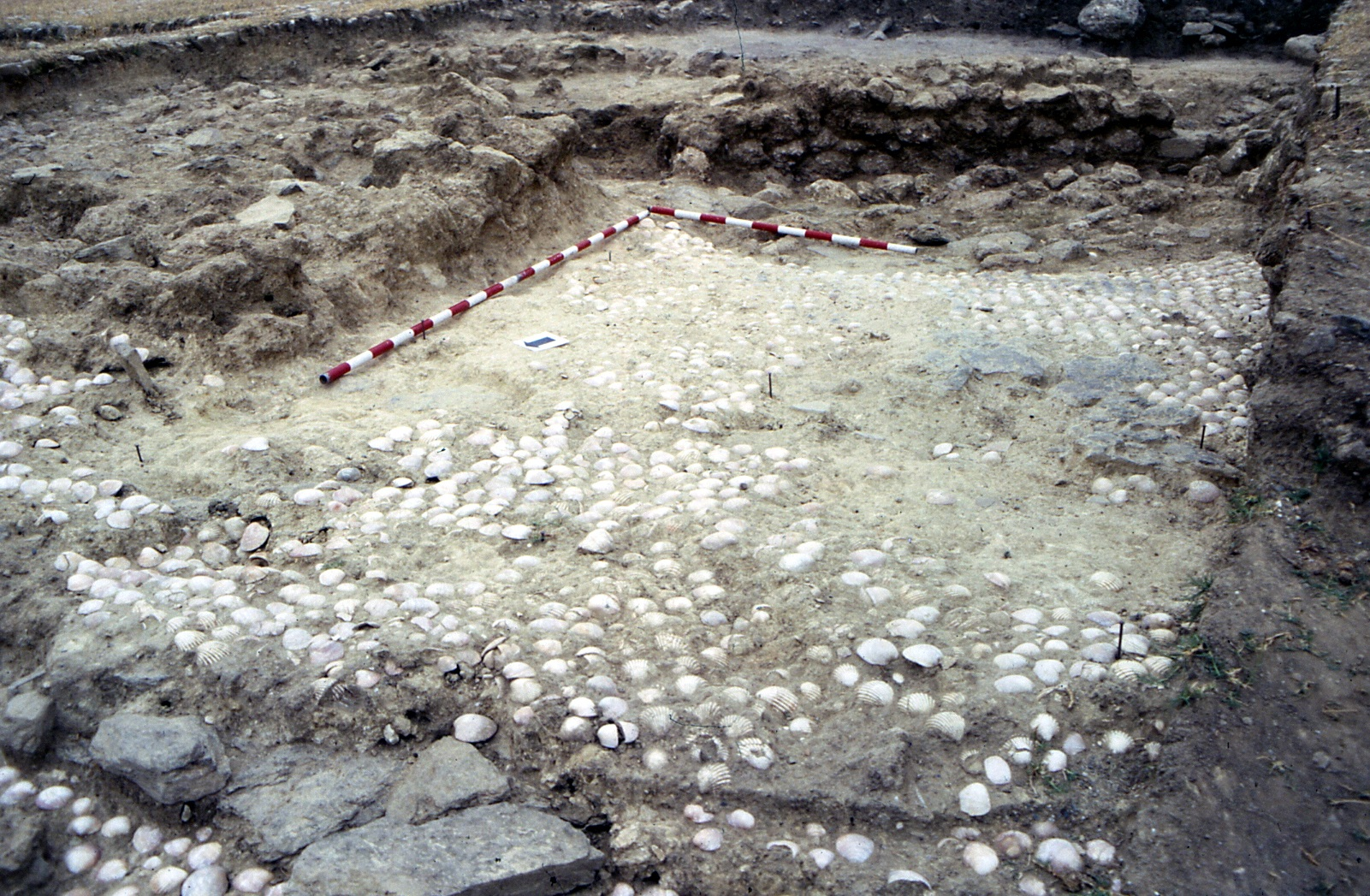 Cerro de la Era